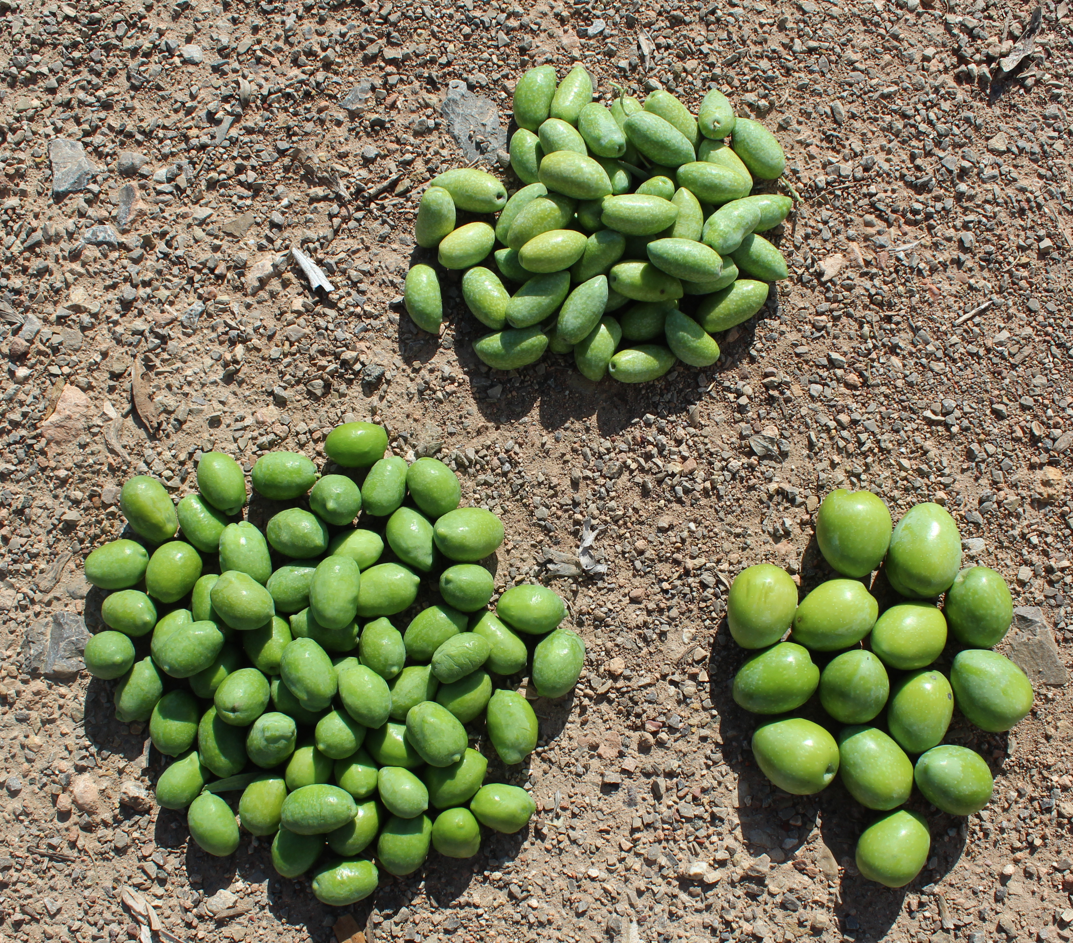 Muestra de variedades de aceituna en la provincia de Jaén. Arriba, Cornezuelo de Jaén. Abajo a la izquierda, de Pico Limón, y a la derecha, Gordal Sevillana.